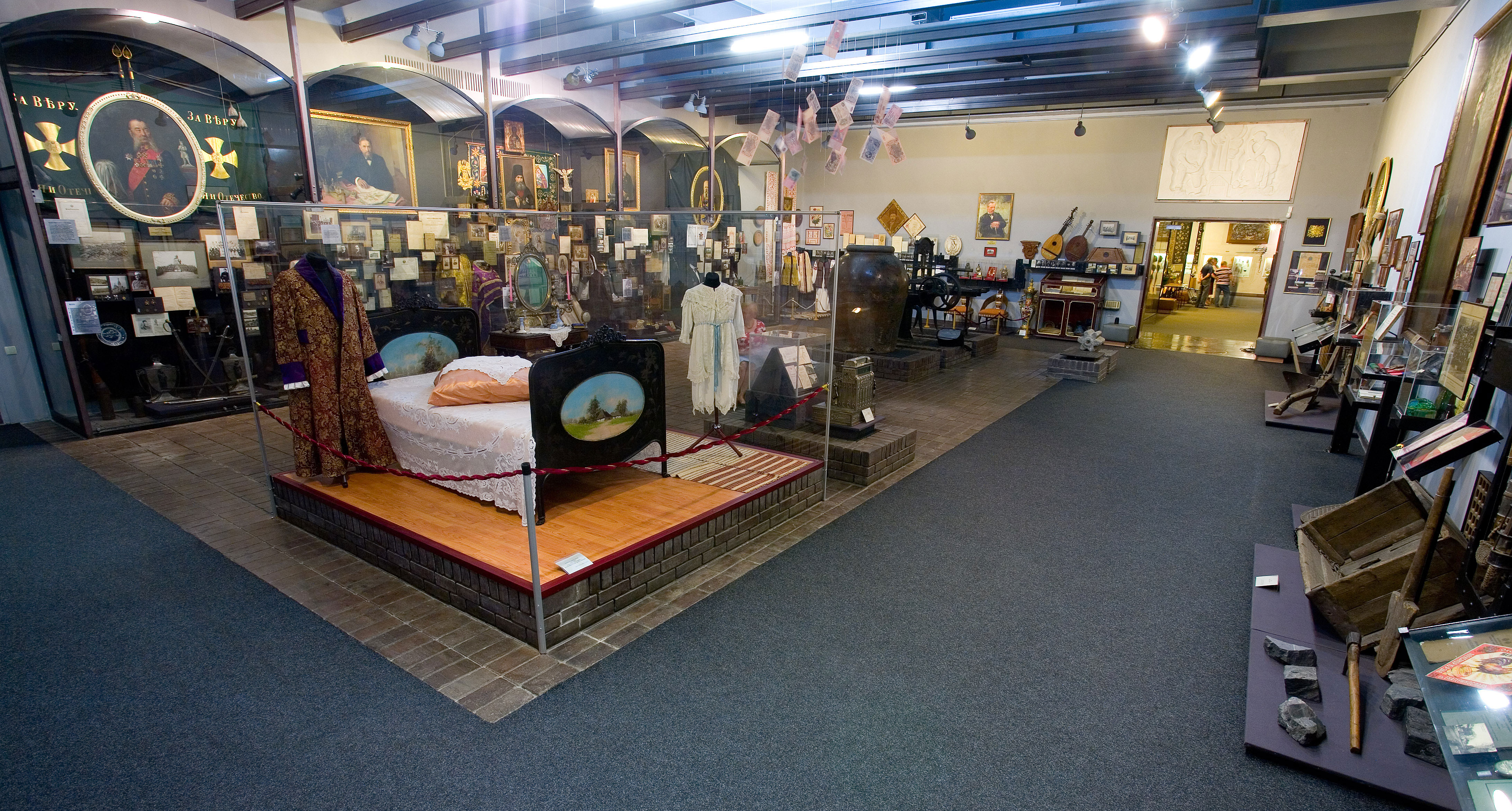 Зала №4. Промисловий розвиток Катеринославщини